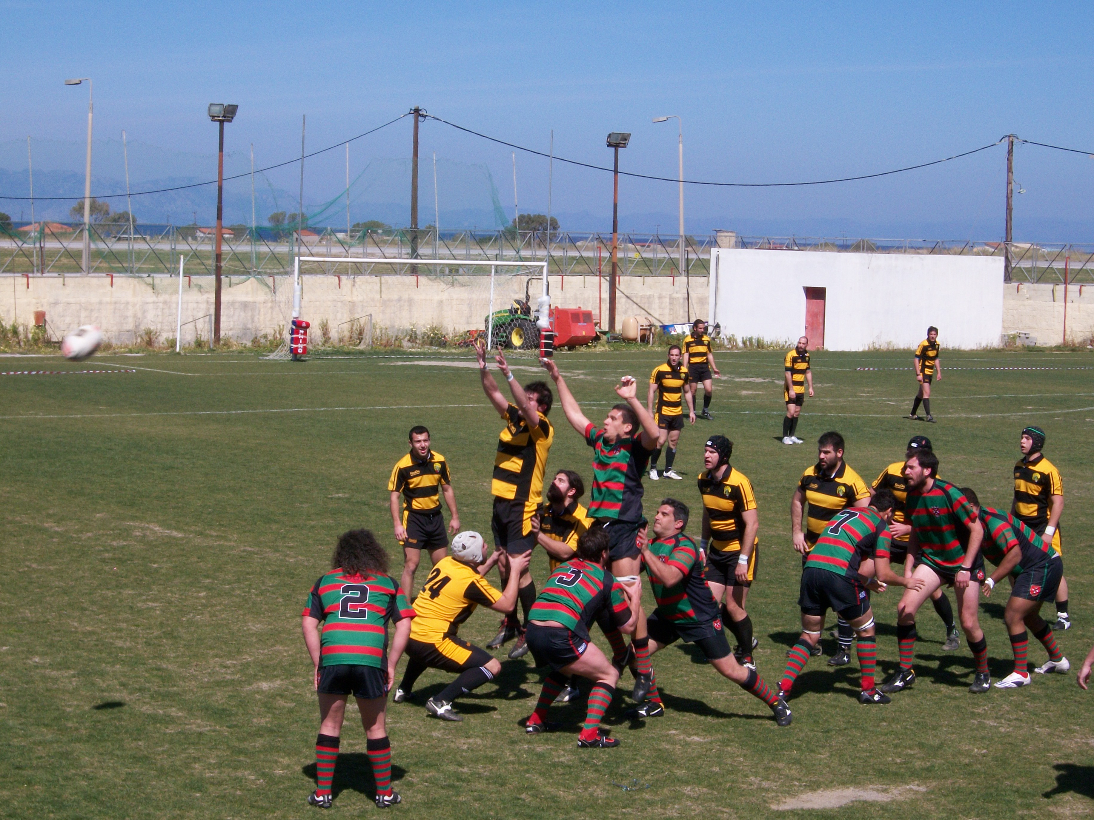 Semi-final 2010 rugby in Greek Championship RugbyXV